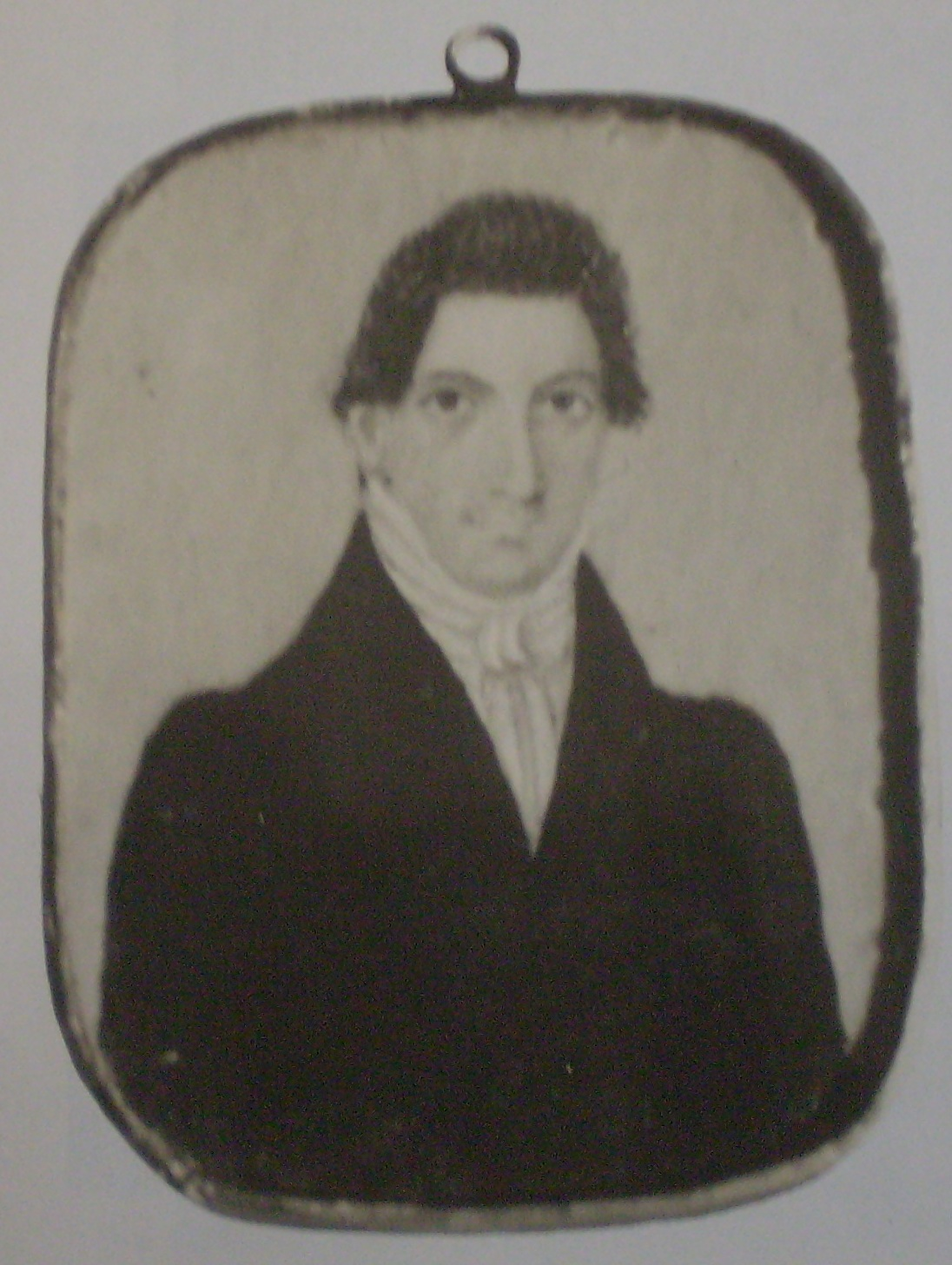 Mariano Boedo. Miniatura, MHN